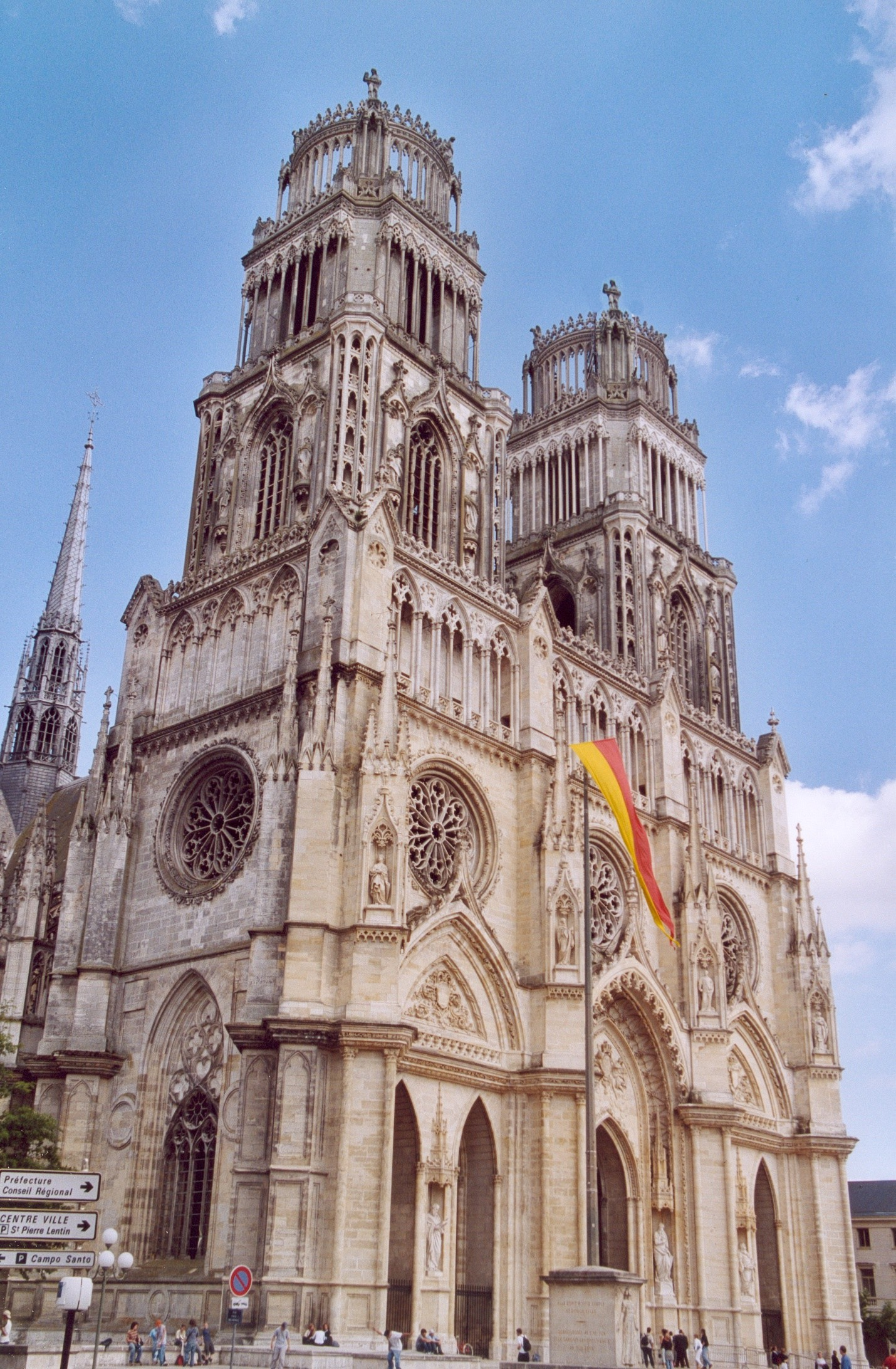 France Loiret Orléans Cathédrale Sainte-Croix Photographie prise par GIRAUD Patrick